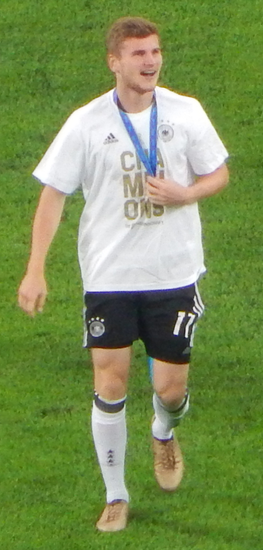 Финал Кубка конфедераций 2017